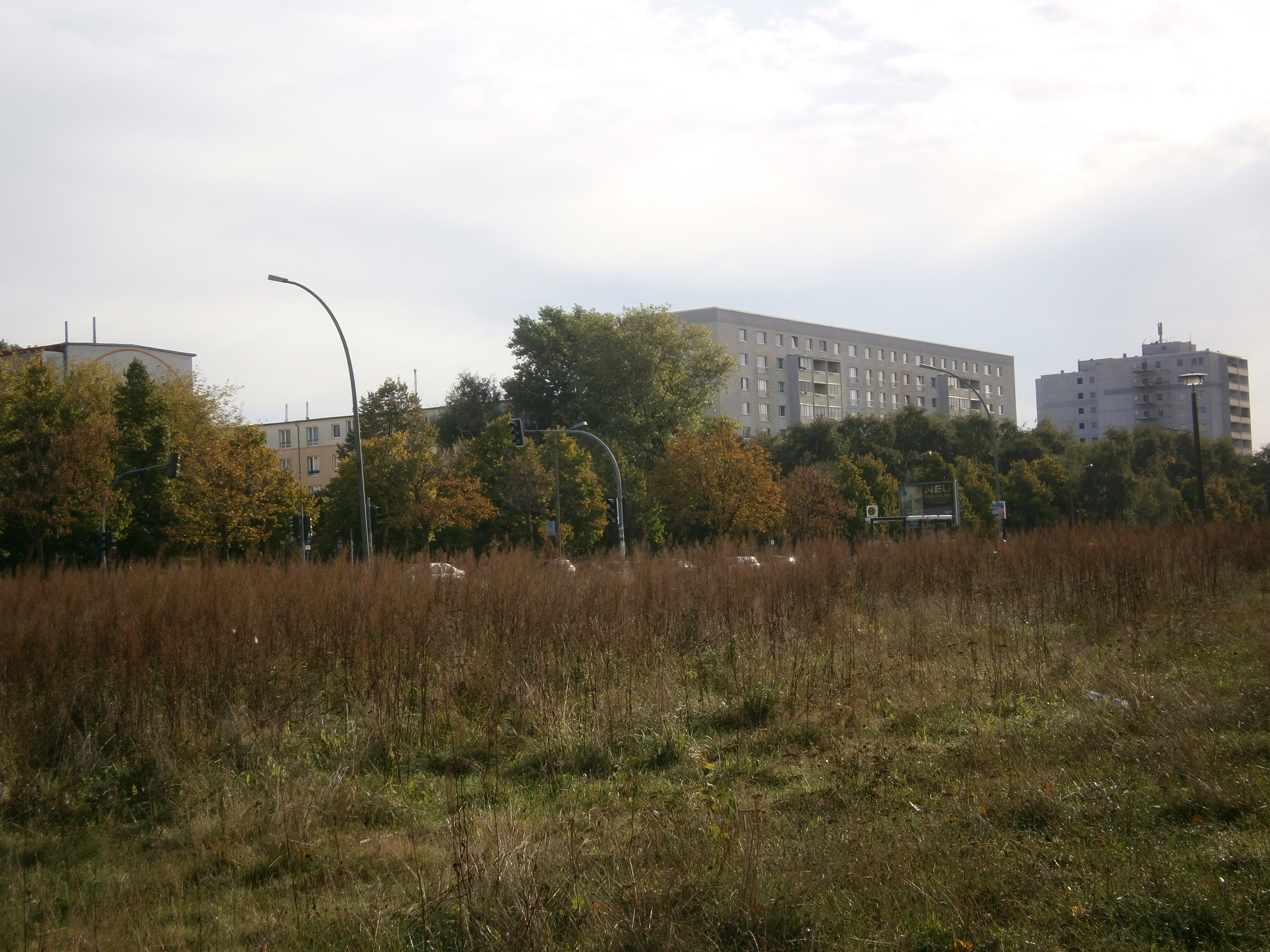 Die Michelangelostraße ist eine Straße im Ortsteil Berlin-Prenzlauer Berg. Hier der Blick von der Grünfläche südlich der Straße nach Osten.